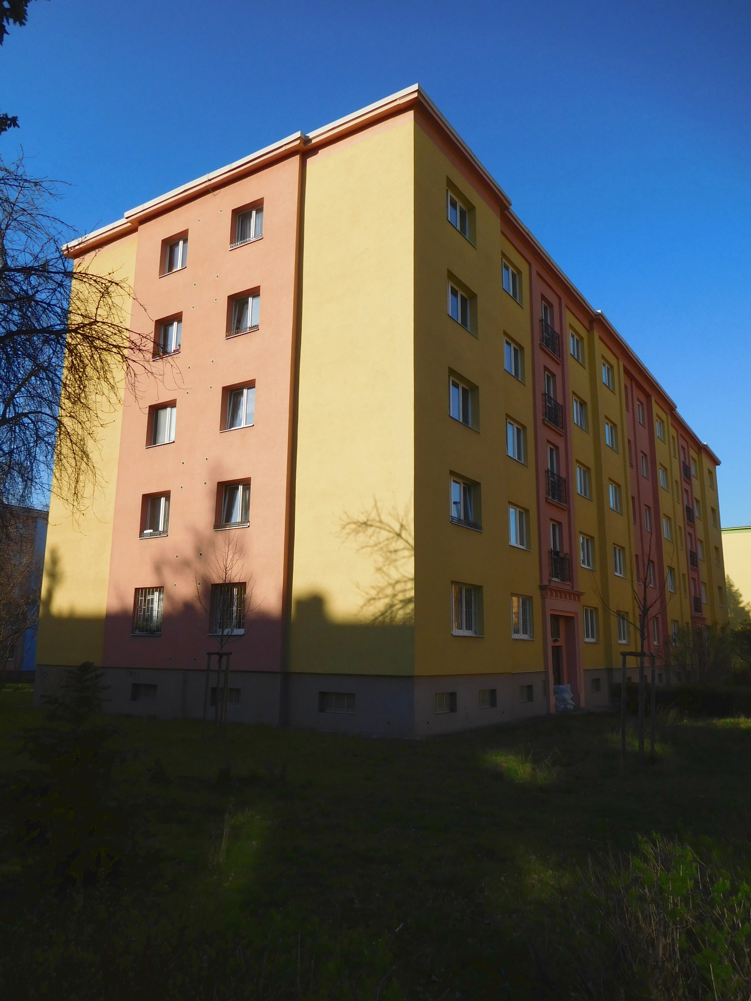 Praha - Strašnice, Nučická 9